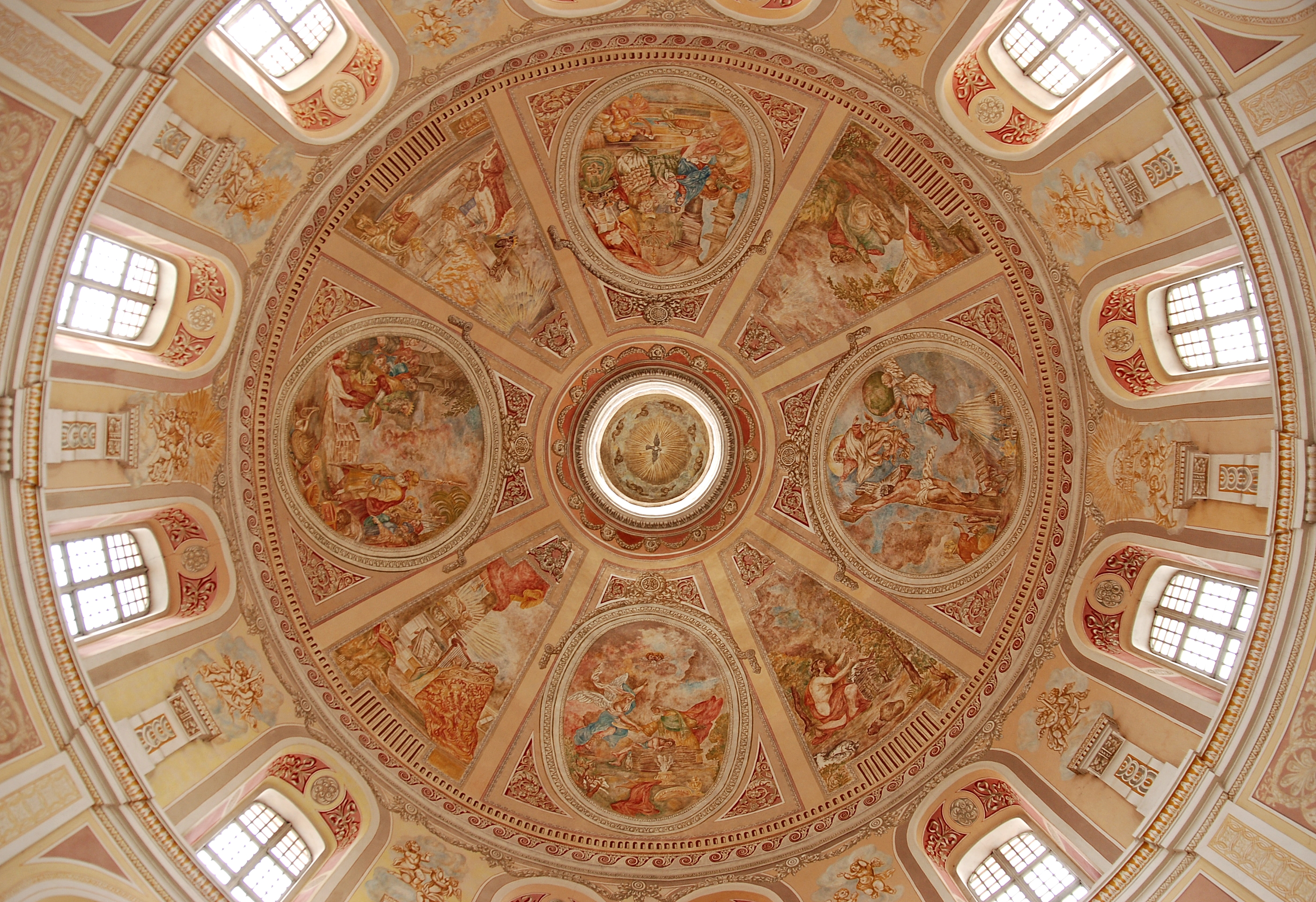 Wnętrze bazyliki w Trzemesznie (wnętrze kopuły)